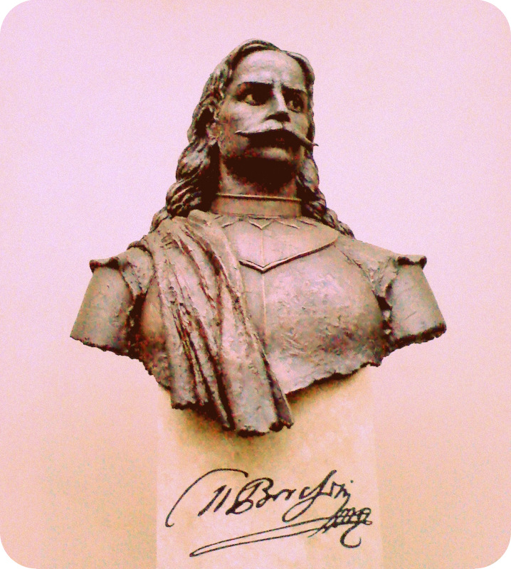 Бюст графа Миклоша Берчени (Bercsényi Miklós) в Ужгородском замке, Украина